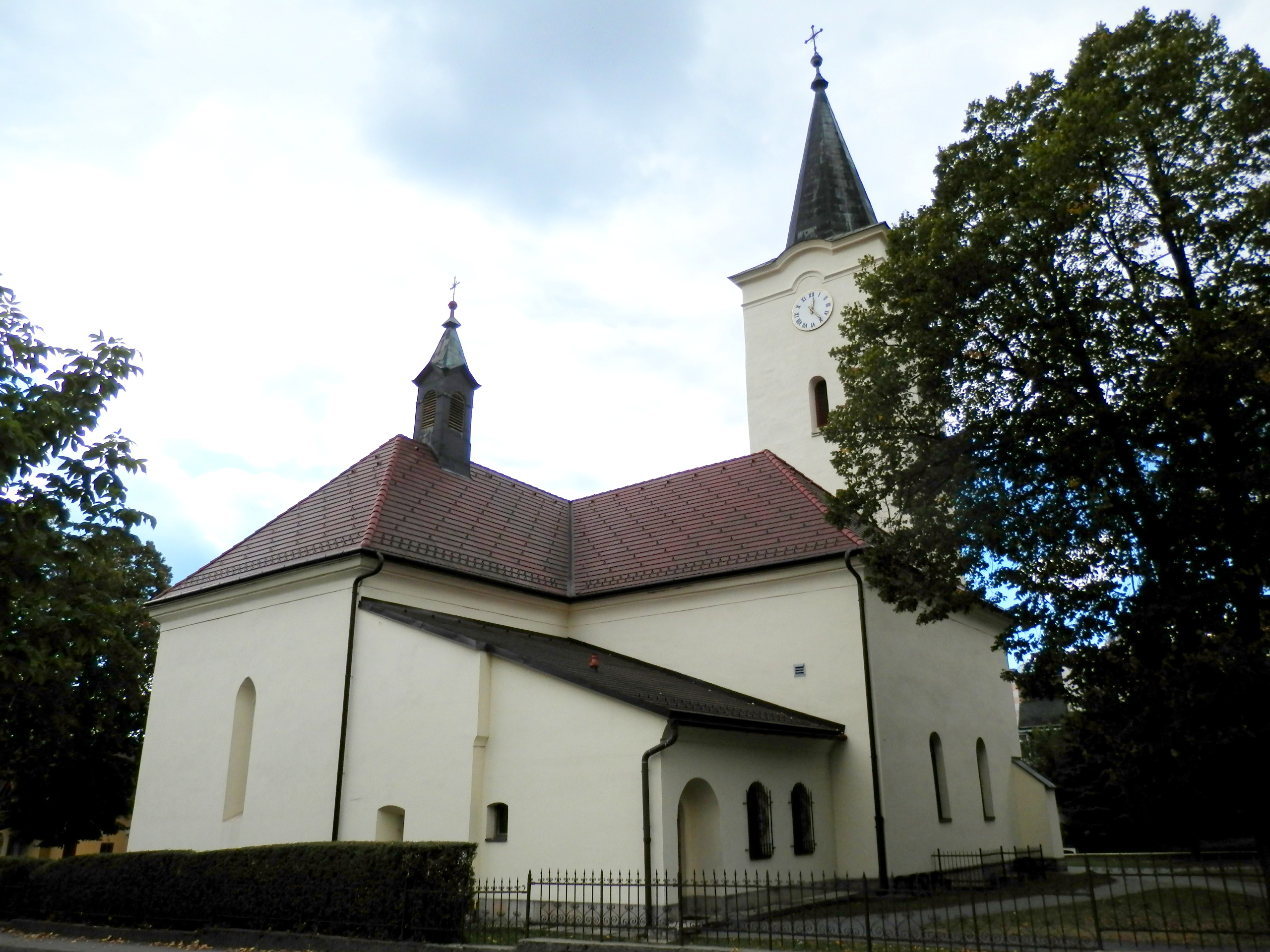 Kostol svätého Martina, mesto Lipany okres Sabinov.